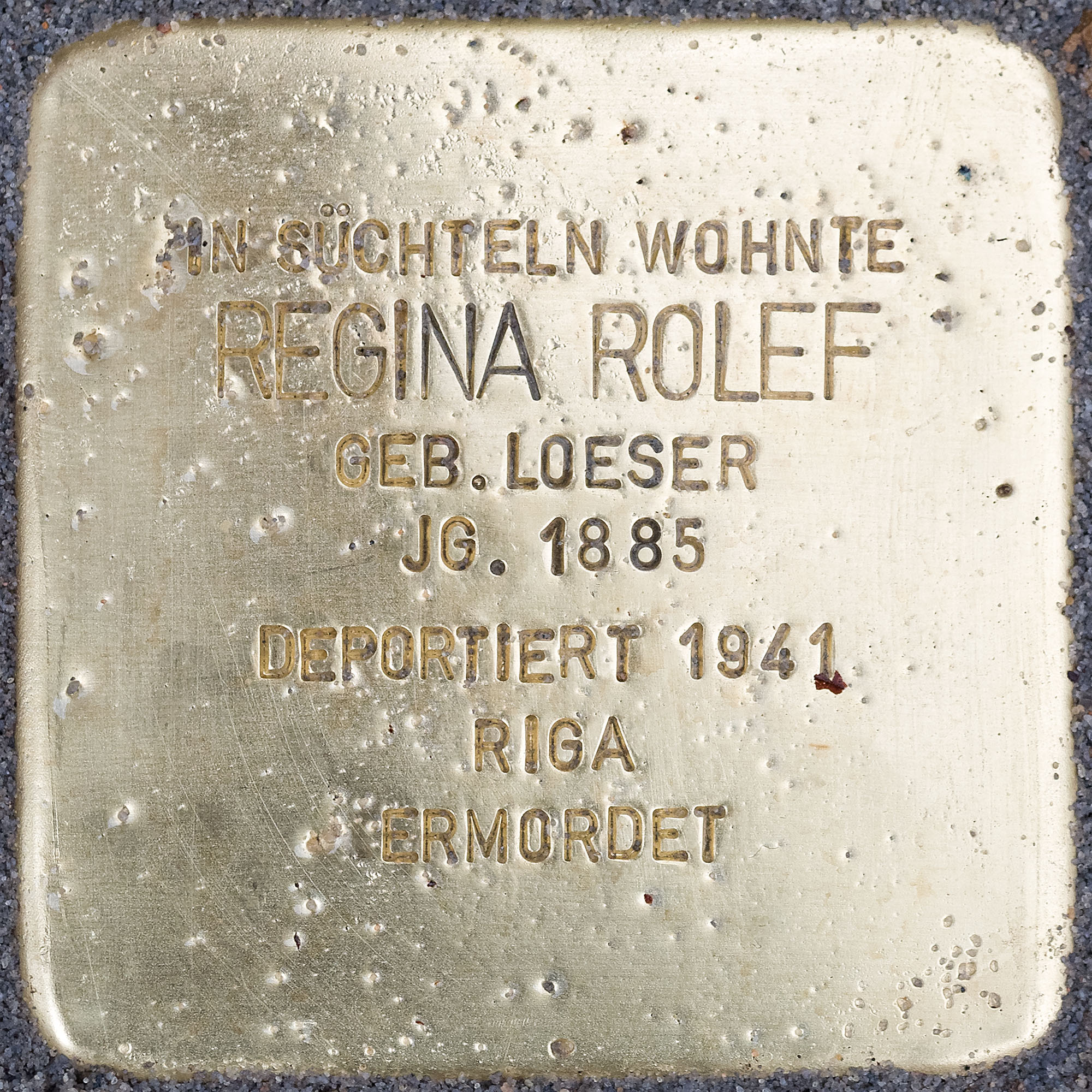 Stolpersteine Suechteln: Rolef, Regina